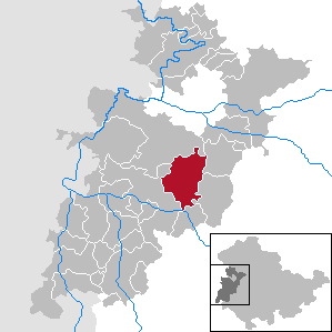 Moorgrund in Thuringia - Wartburgkreis